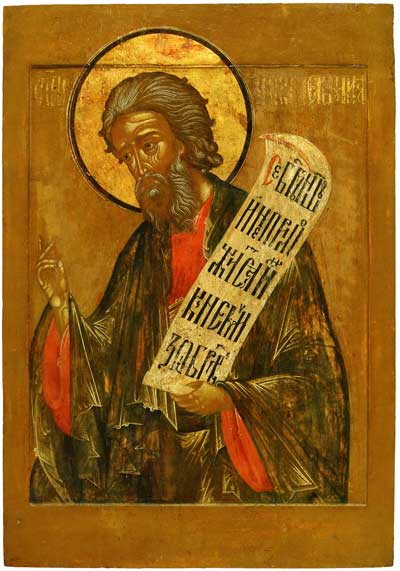 Пророк Иеремия. Пророческий чин из главного иконостаса ц. Иоанна Златоуста в Коровниках в Ярославле. Ок. 1654 г. Ярославский историко-архитектурный и художественный музей заповедник, Ярославль, Россия